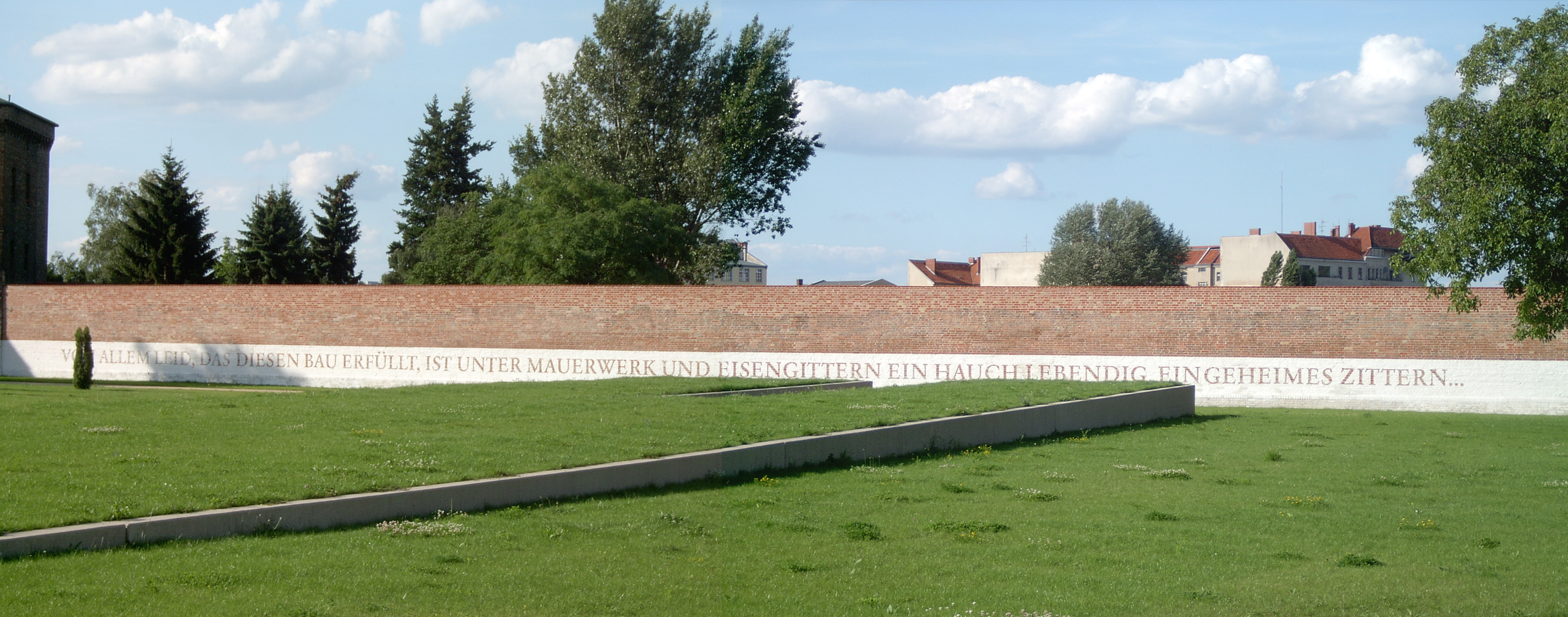 Panoramabild einer Zeile von Albrecht Haushofer (Moabiter Sonette). Schriftzug: "Von allem Leid, das diesen Bau erfüllt, ist unter Mauerwerk und Eisengittern ein Hauch lebendig, ein geheimes Zittern"